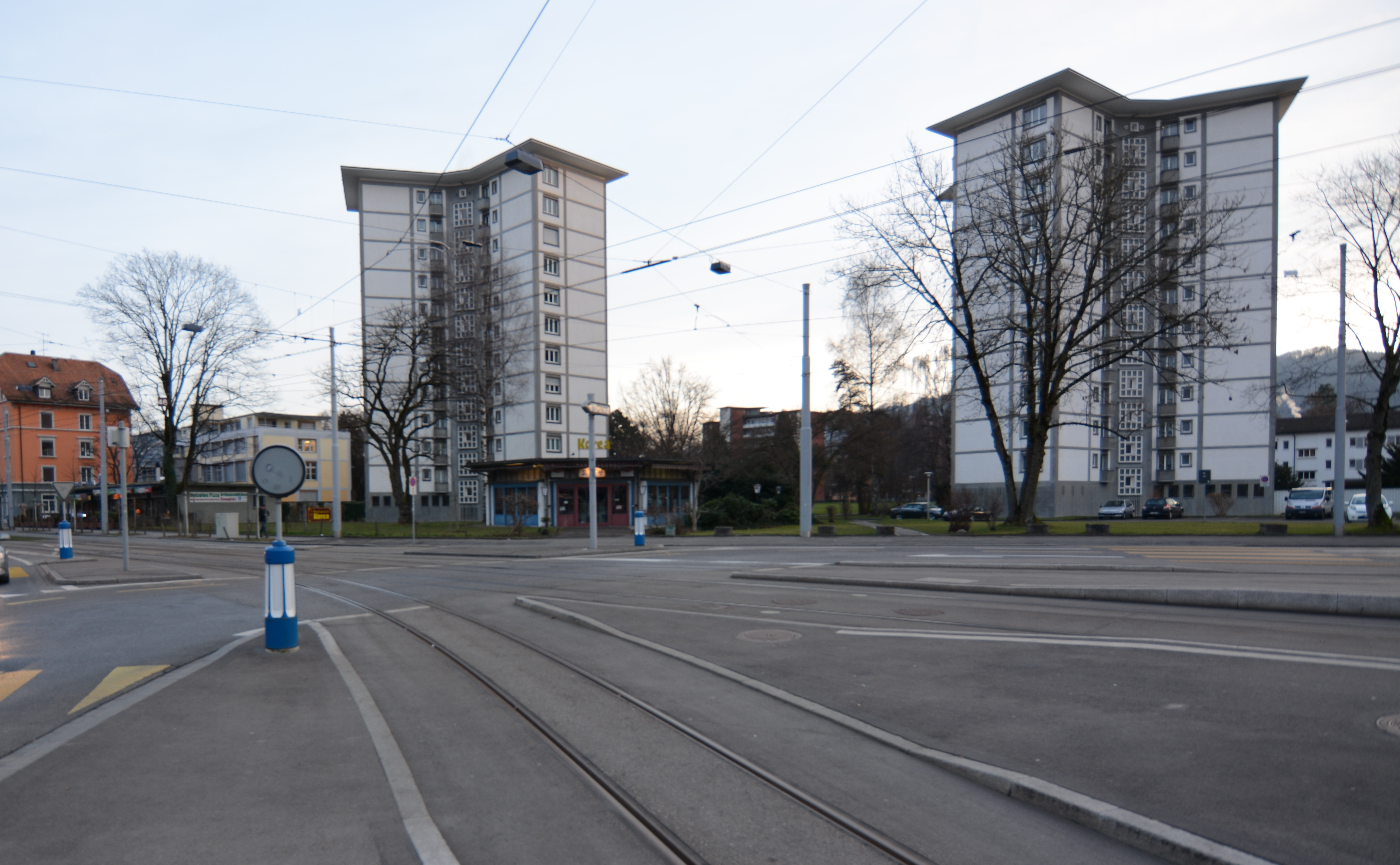 Wohnsiedlung Heiligfeld der Stadt Zürich, Architekt: Stadtbaumeister Albert Heinrich Steiner, 1953–55